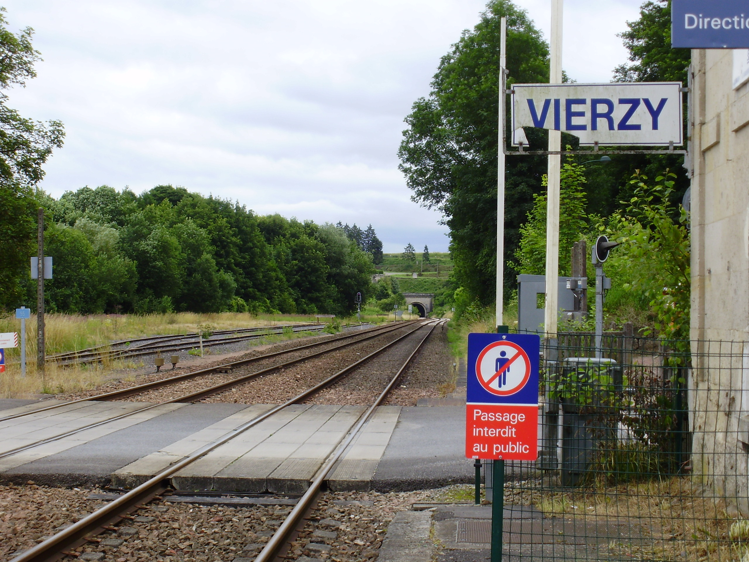 Gare de Vierzy, Aisne, France : voies en regardant vers Soissons depuis le quai pour Paris, avec le passage à niveau de la D 808 au premier plan et l'entrée sud-ouest du tunnel de Vierzy à l'arrière-plan.